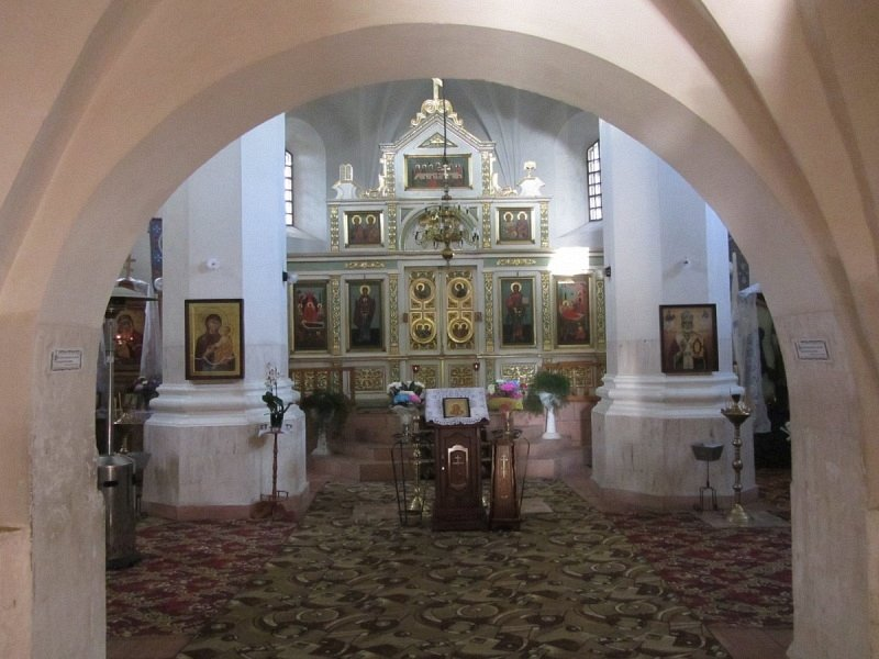 Царква ў Мураванцы. Іканастас